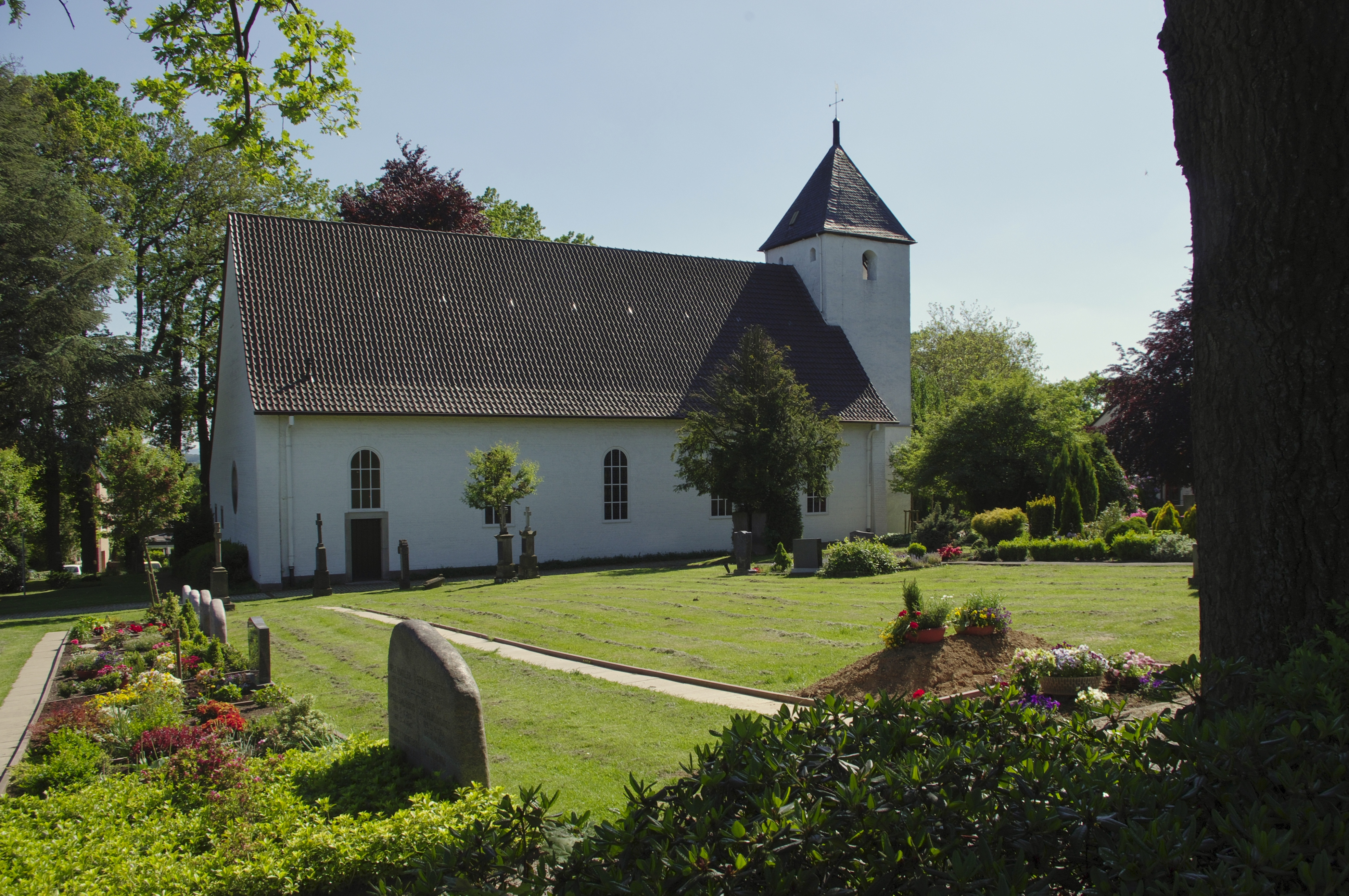 Autobahnkirche Exter, Ansicht von Nordost